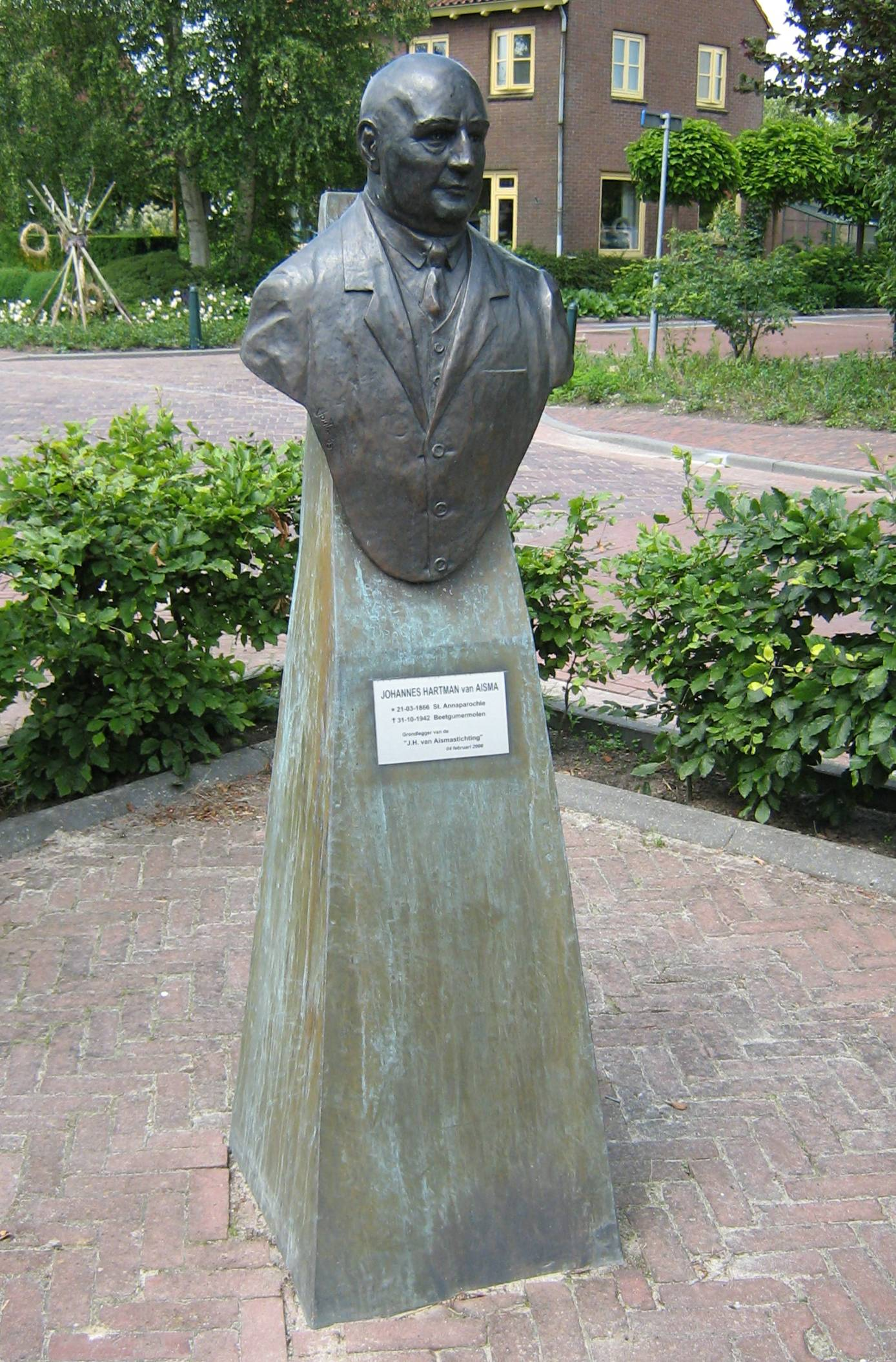 Hans Jouta, 2006